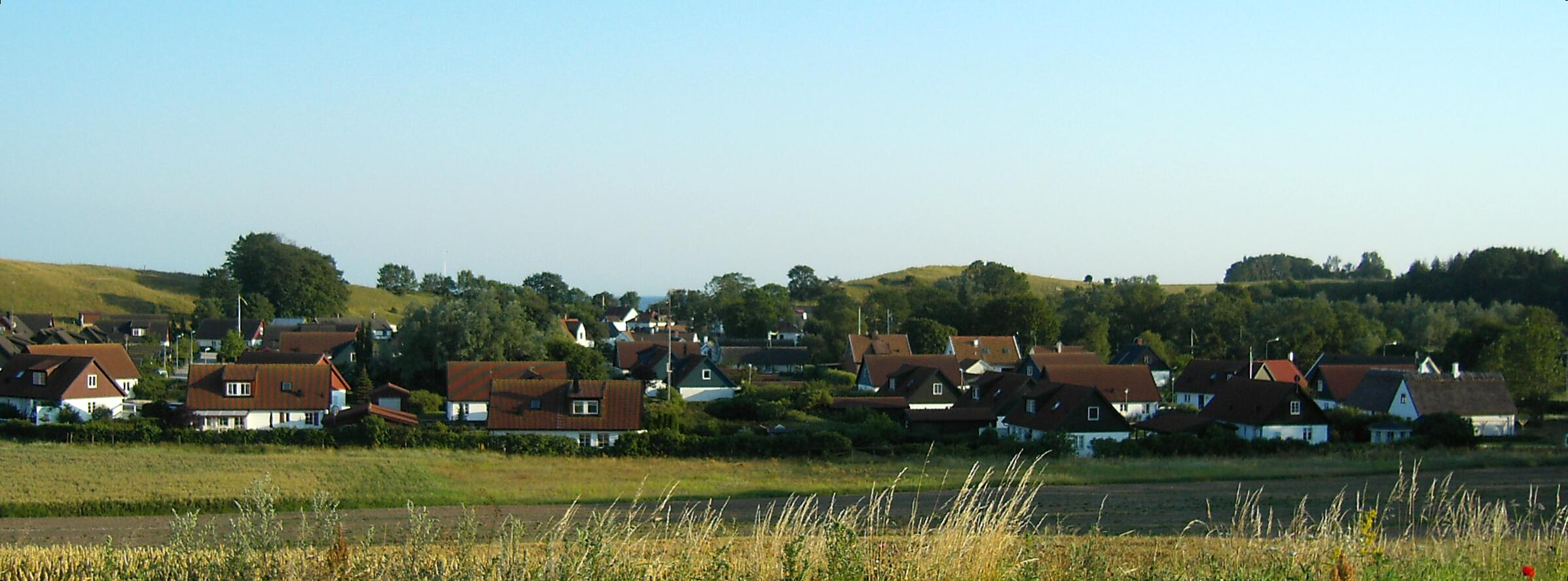 Kåseberga, Ystad municipality